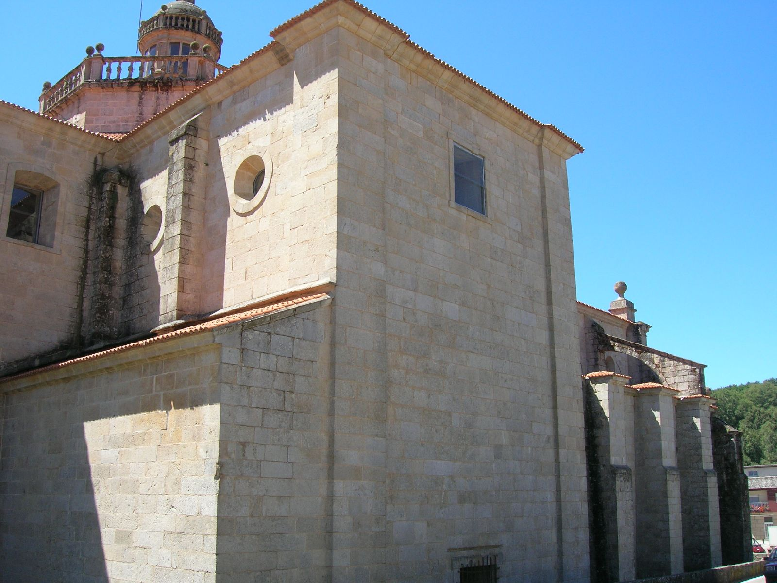 Monasterio de Montederramo. Fachada norte de la iglesia.